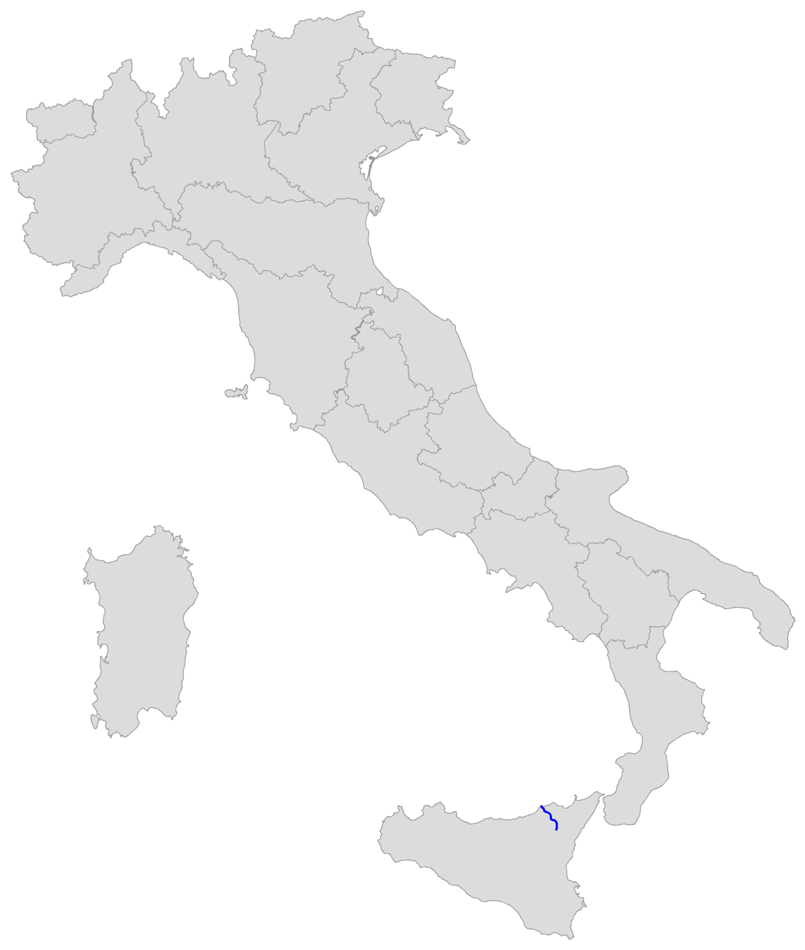 Percorso della SS 116 Randazzo-Capo d'Orlando